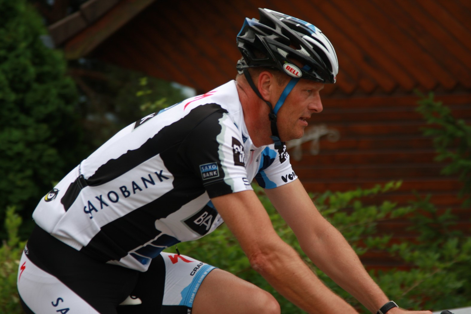 8928 bjarne riis